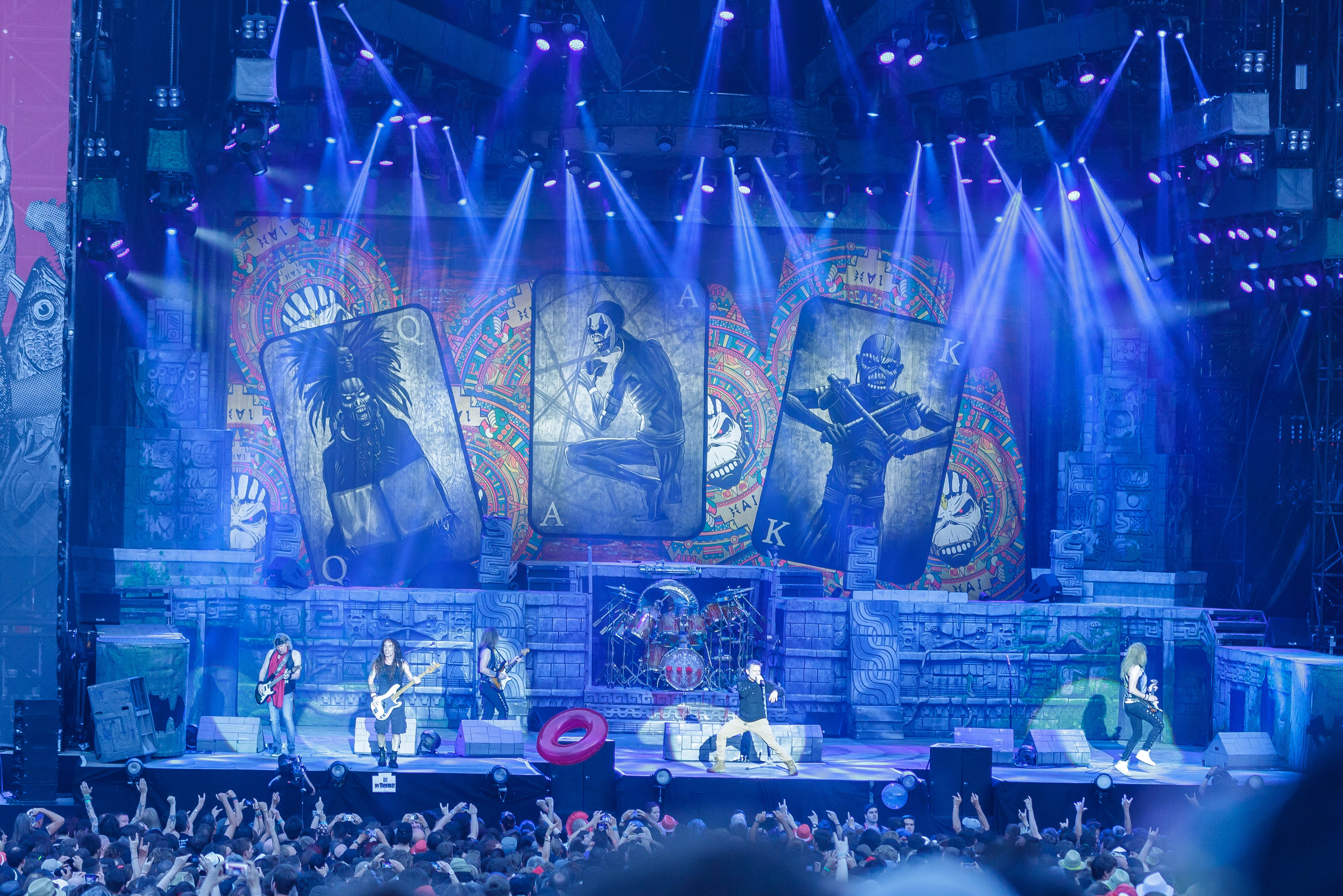 Paléo Festival Nyon, édition 2016, 19-24 juillet 2016. Mercredi 20: Iron Maiden (heavy-metal, Grande-Bretagne)